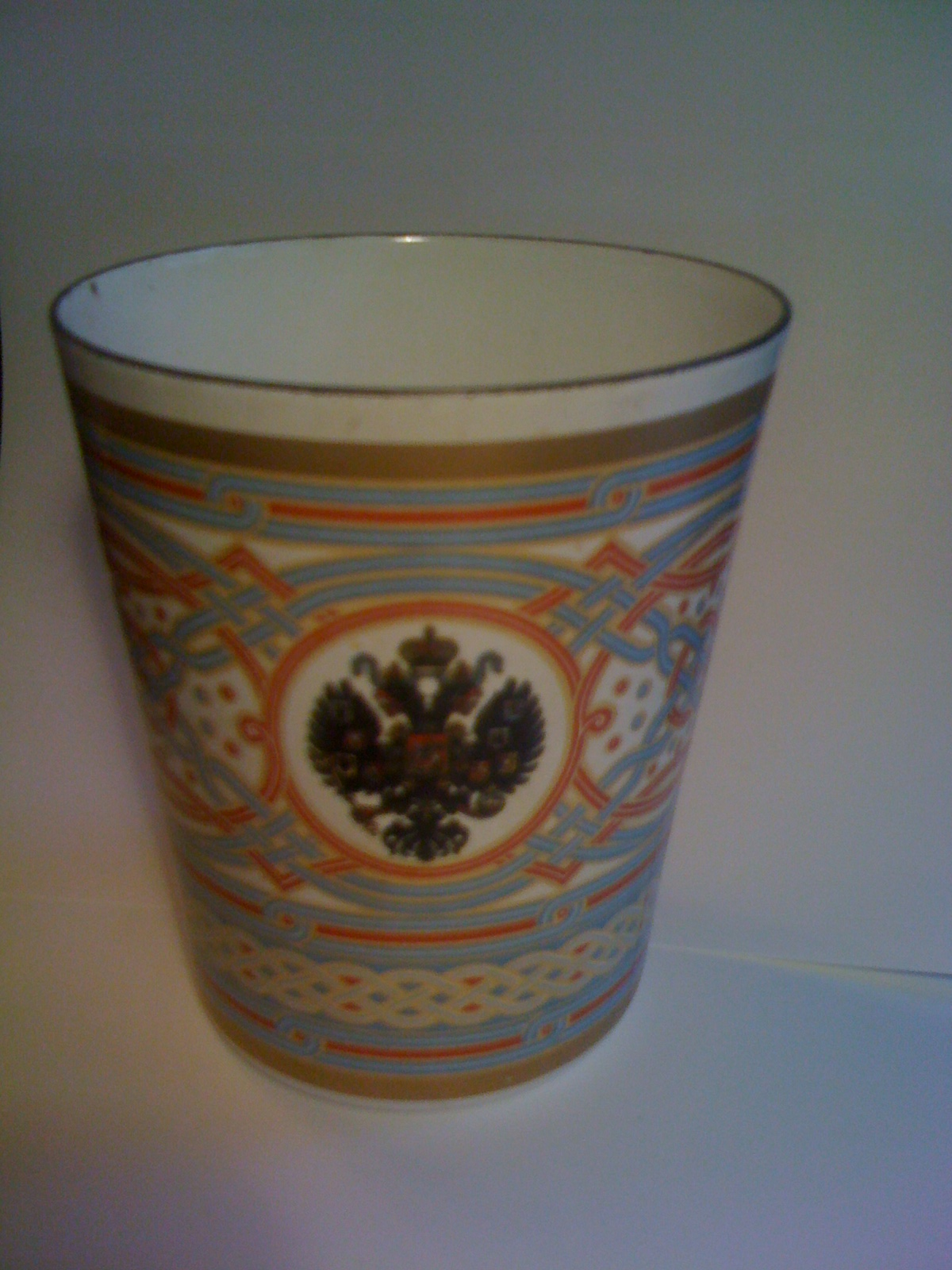 Reproduction du gobelet distribué à Khodynka (Asta Ullrich AG,1980)